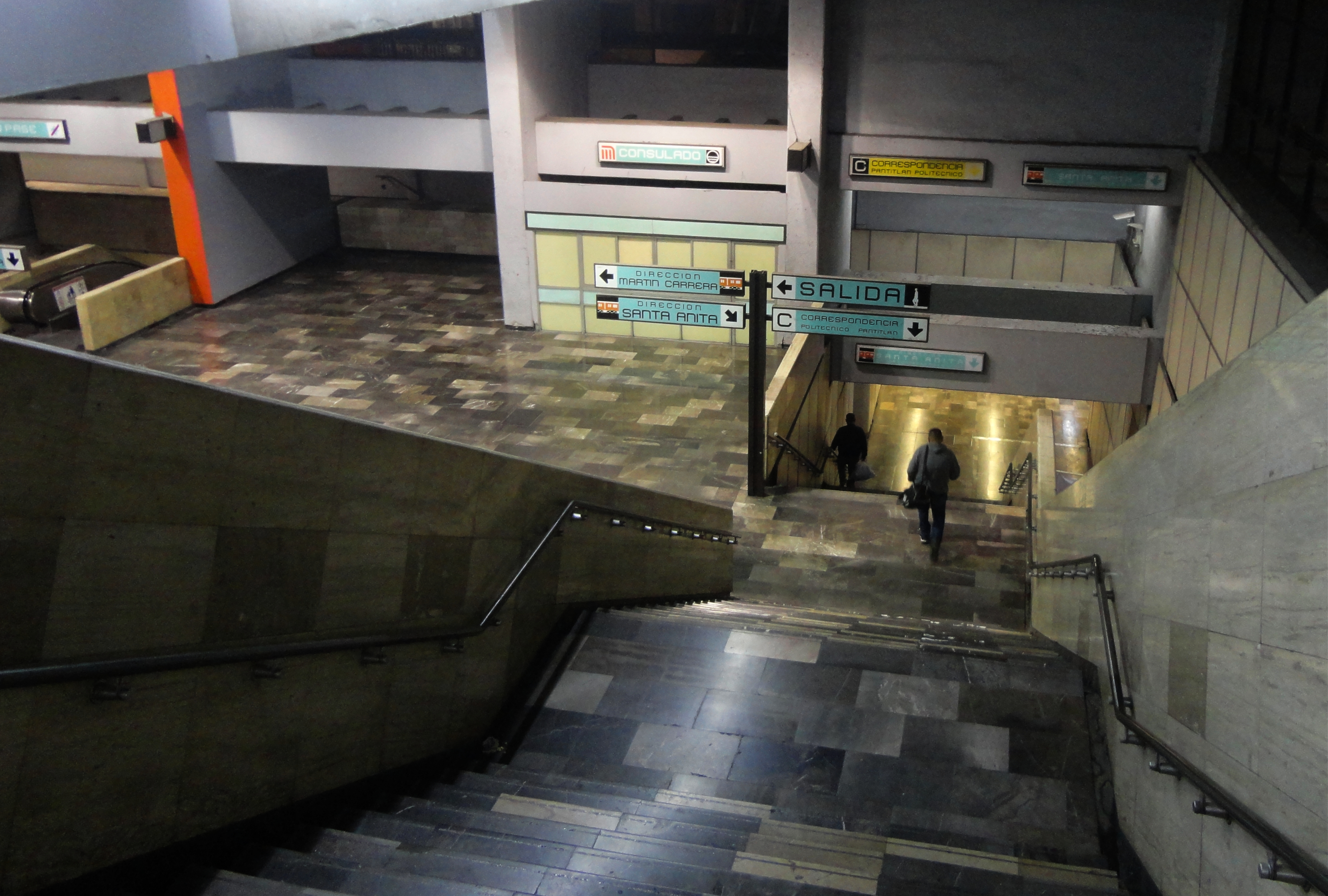 Estación Consulado - Metro de la Ciudad de México - Línea 4